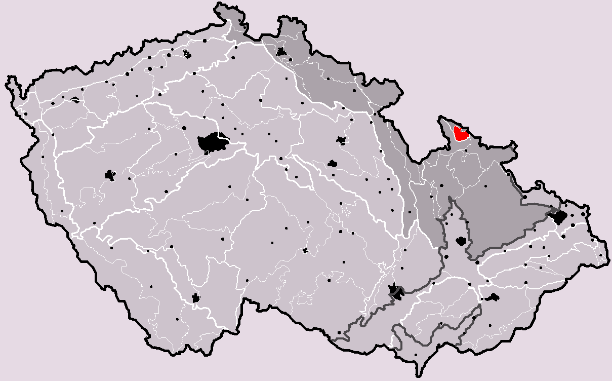 Poloha geomorfologického celku Žulovská pahorkatina v rámci České republiky. Hercynský systém Hercynská pohoří I Česká vysočina I4 (IV) Krkonošsko-jesenická subprovincie I4D (IVD) Krkonošsko-jesenické podhůří I4D-2 (IVD-2) Žulovská pahorkatina